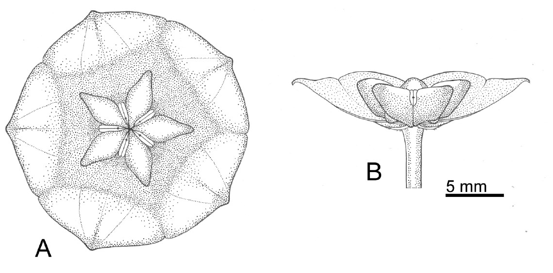 Hoya danumensis subsp amarii S.Rahayu & Rodda 2019, Asclepiadoideae, Apocynaceae, from Rahayu & Rodda (2019: Fig. 1 A B)